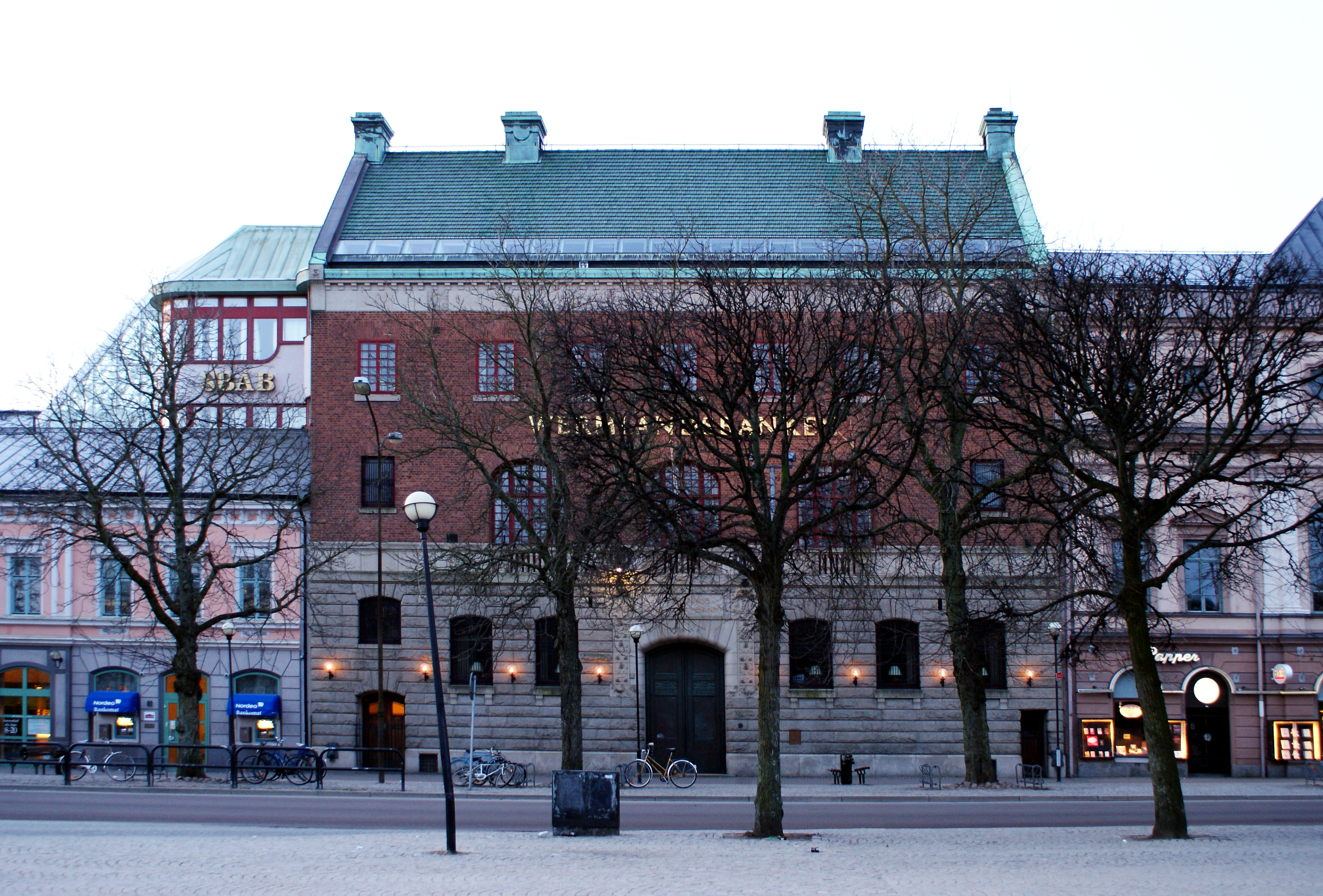 Gamla Wermlandsbanken i Karlstad